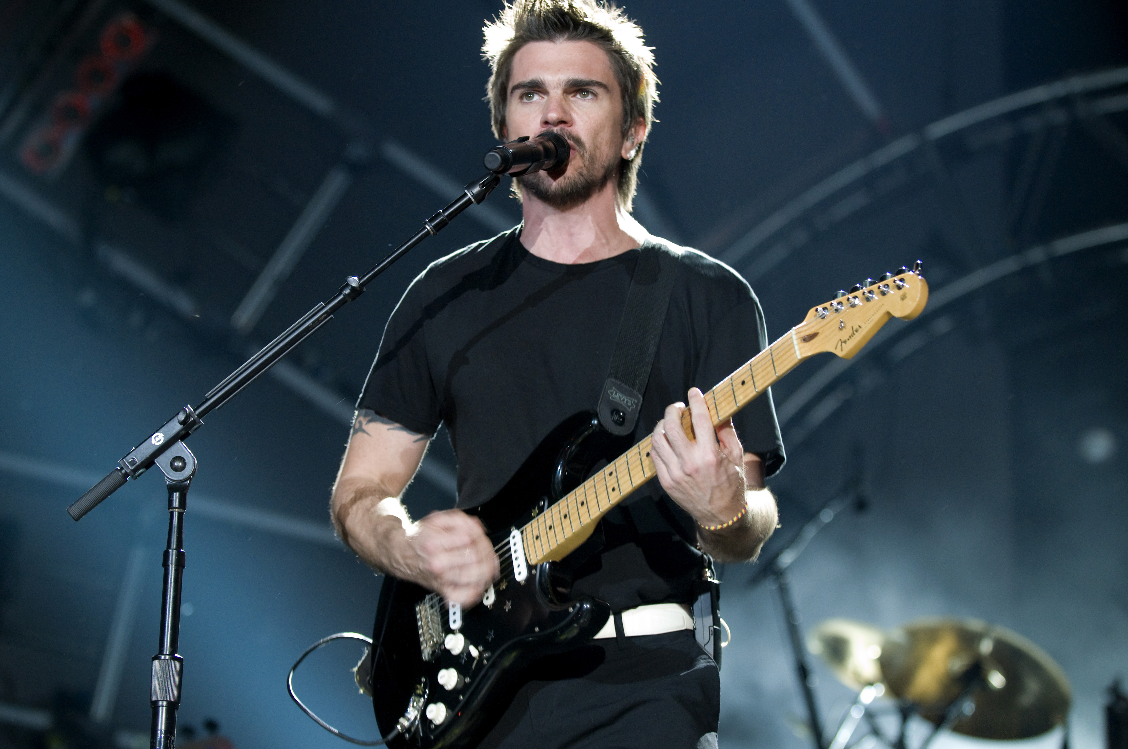 Juanes